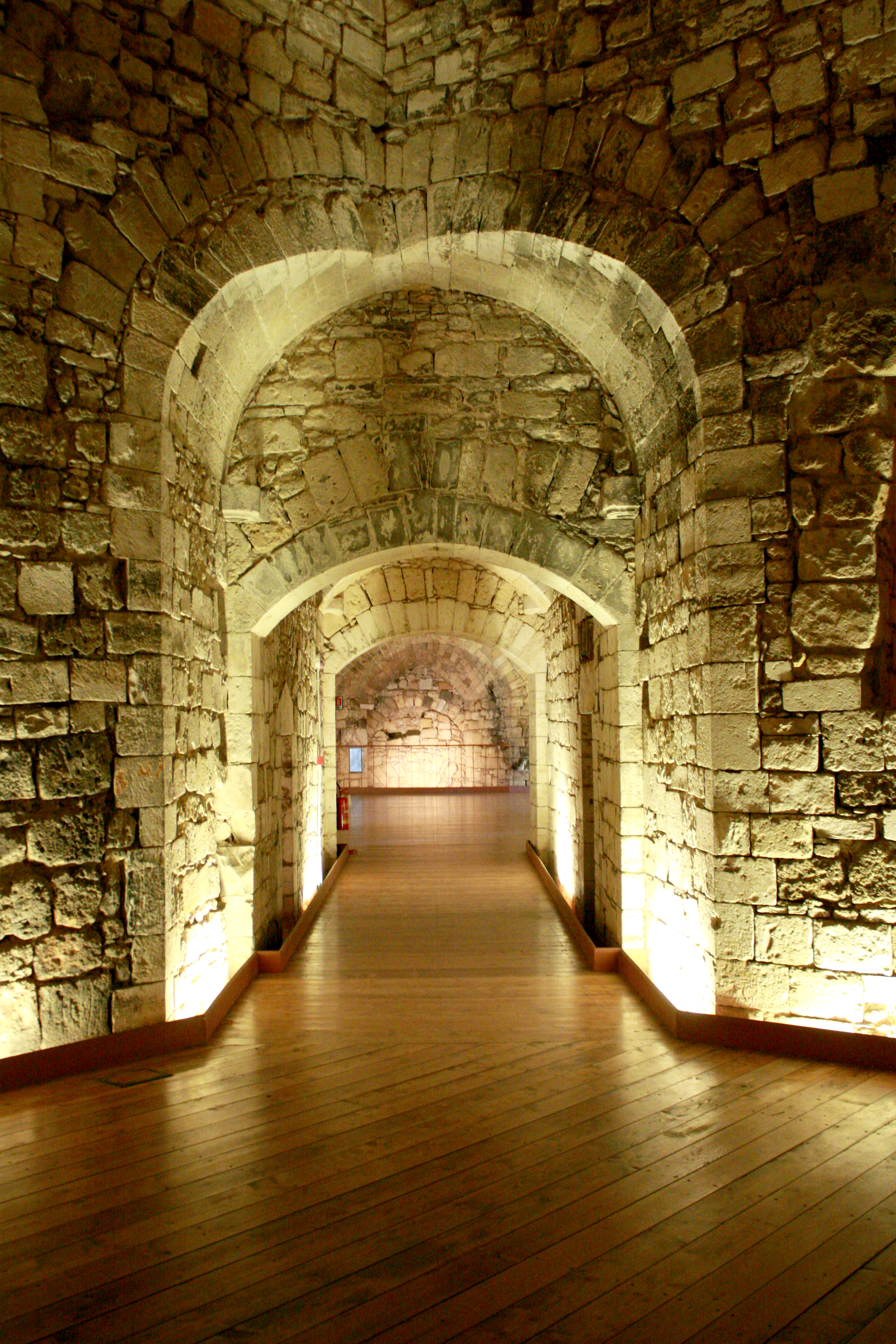 Castello di Barletta - Sotterranei verso nord-est (bastione di Sant'Antonio)